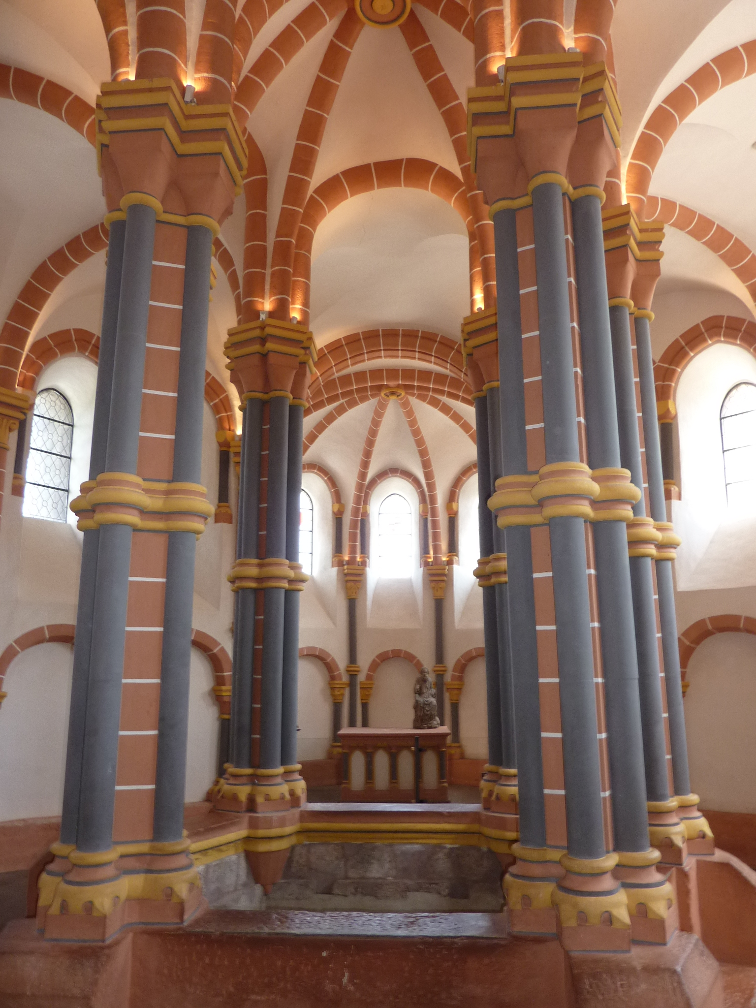 Chapel of Vianden castle